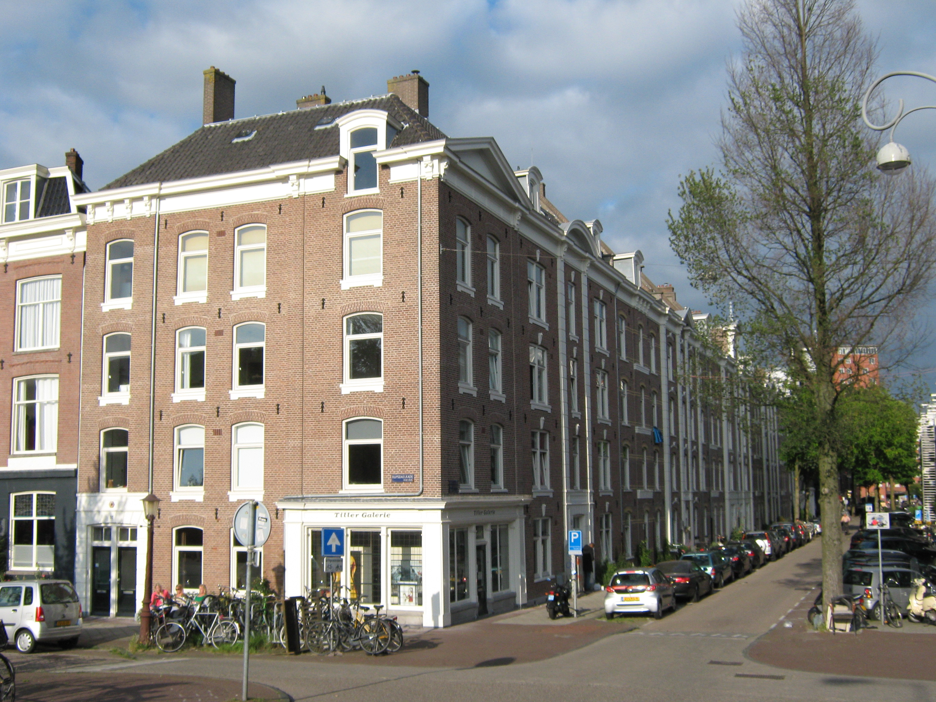 Gebouw ontworpen door P.J. Hamer en zijn zoon W. Hamer in 1876, in opdracht van de Vereeniging ten behoeve der Arbeidersklasse te Amsterdam: Eerste Jacob van Campenstraat 1-21, op de foto hoek Ruysdaelkade/ Eerste Jacob van Campenstraat Amsterdam. Op deze hoek is tegenwoordig de Tiller Galerie Amsterdam gevestigd